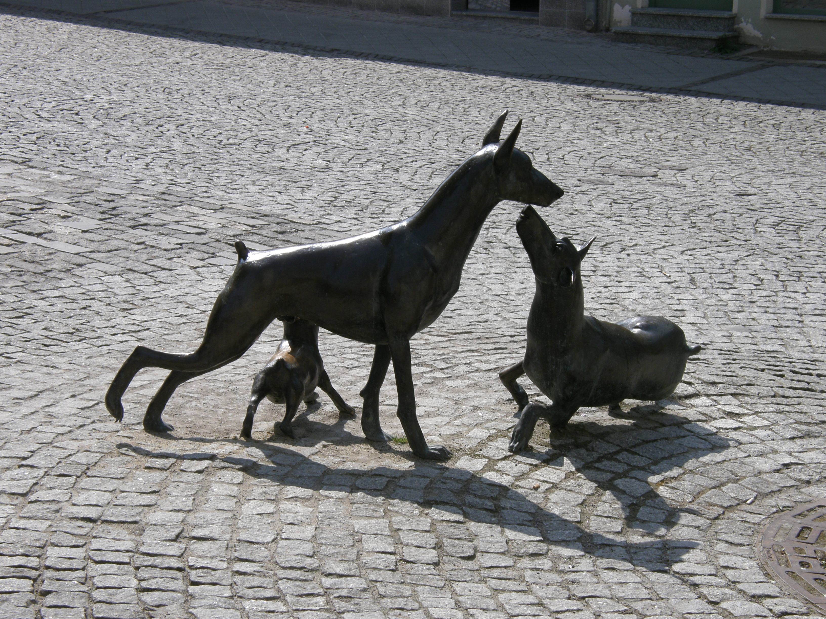 Stadt Apolda - Dobermann Denkmal, Blick von den Bänken